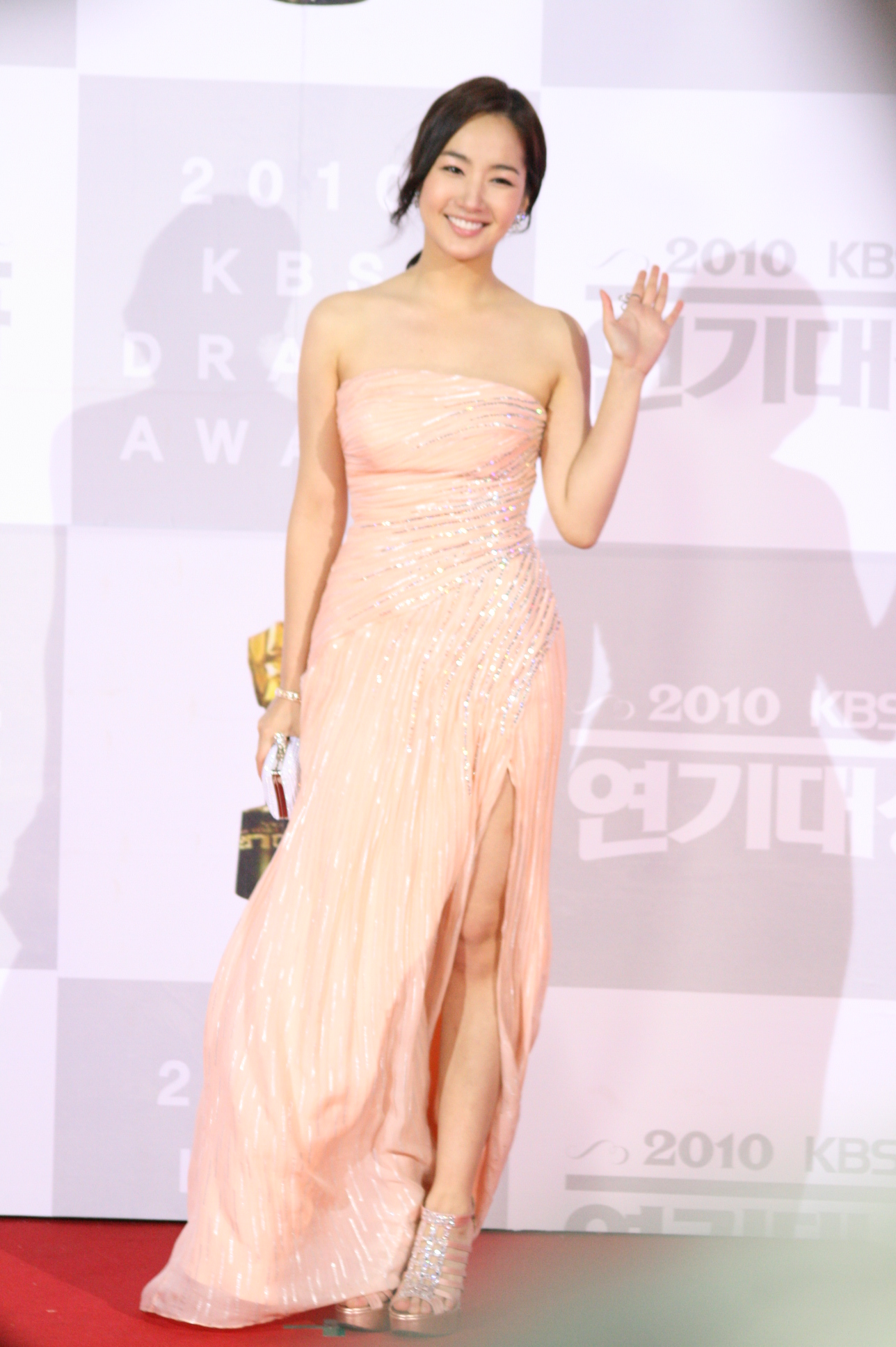 2010년 12월 31일 열린 2010 KBS 연기대상에서의 박민영.